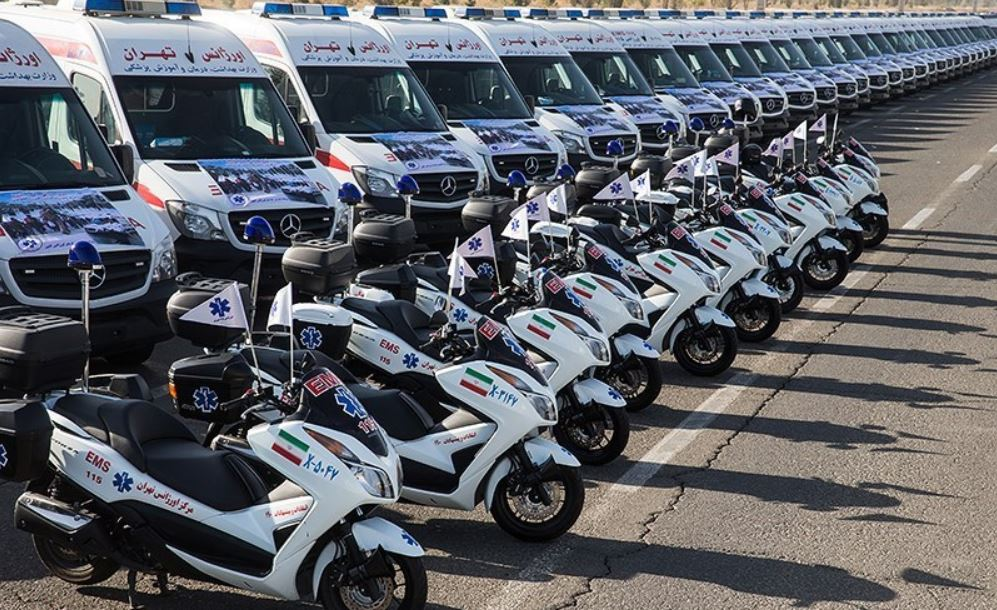 آمبولانس و تجهیزات پزشکی ارسال شده به کشور عراق از سوی ایران